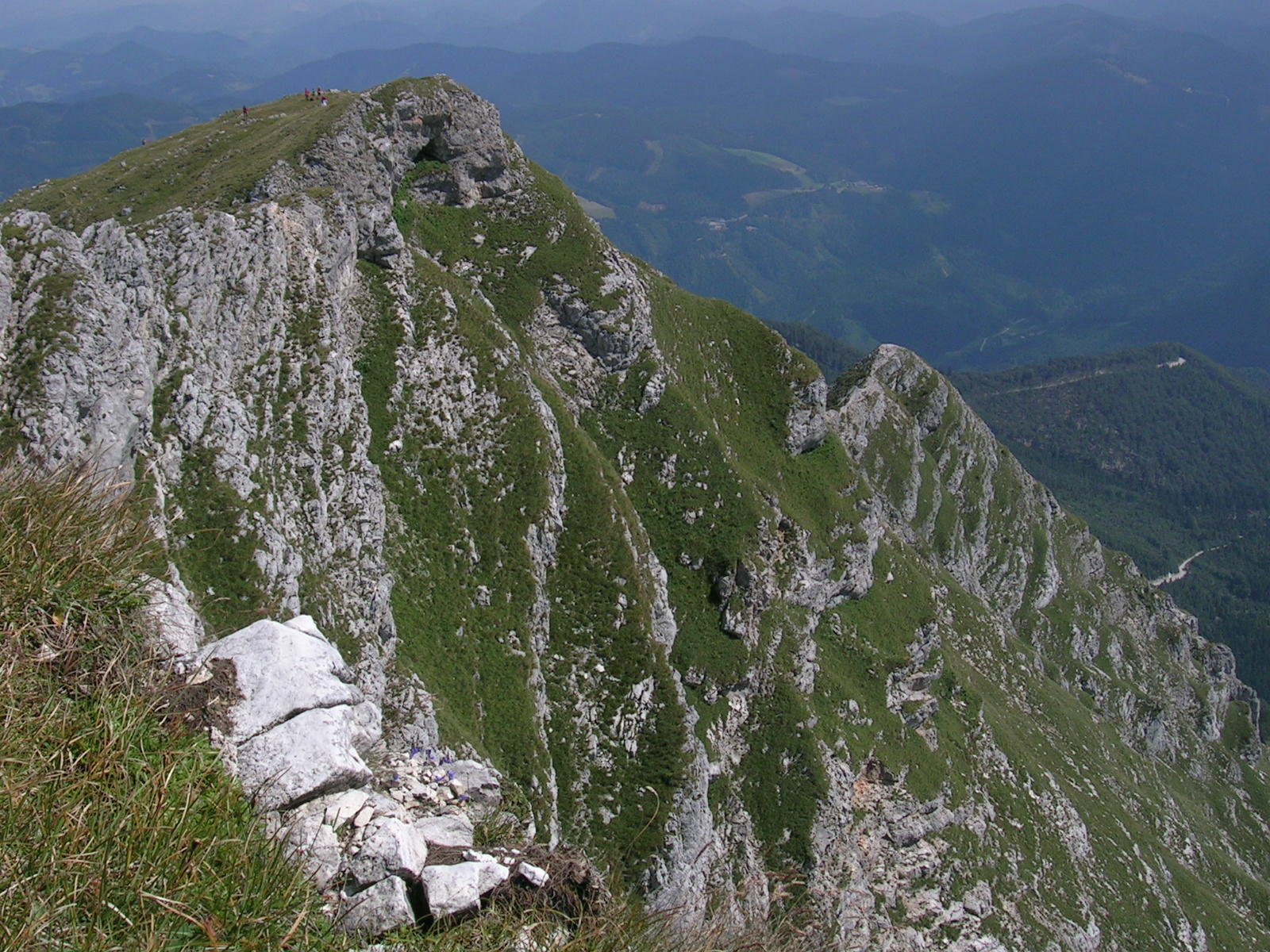 "Vater Ötscher" (NÖ, Ybbstaler Alpen), östlicher Vorgipfel rechts "Rauher Kamm" (dahinter ist er noch steiler!) Blickrichtung ~Ost, fotogr. Geof August 2006